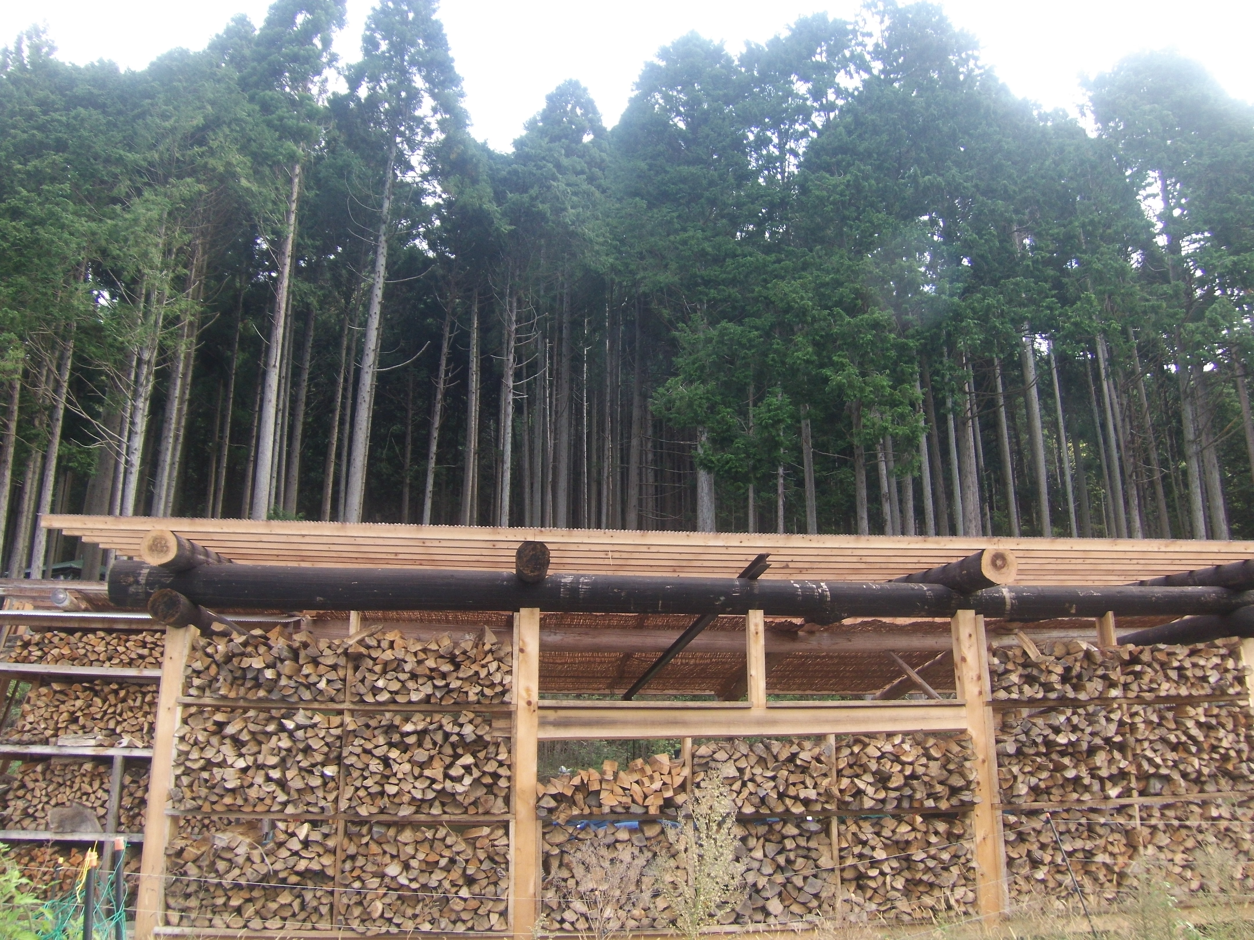 南丹市美山町での北山杉による林業